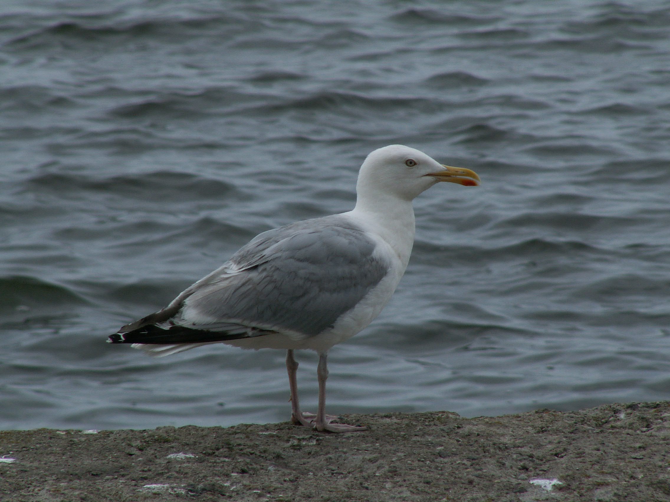 Mewa srebrzysta - osobnik dorosły.